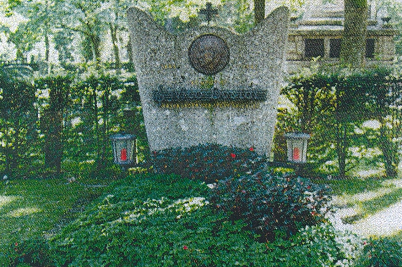 Kommunalfriedhof Salzburg-Lillie Dostal